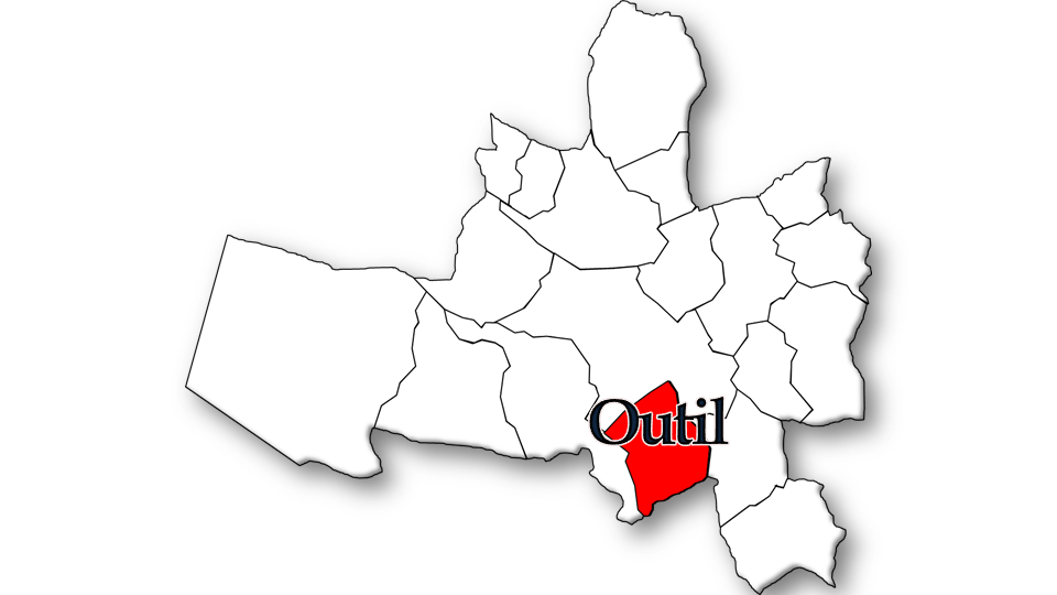 População